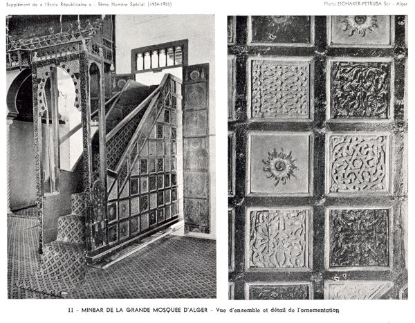 Minbar de la grande mosquée d'Alger (Djamaa el Kebir) datant du Xe siècle.